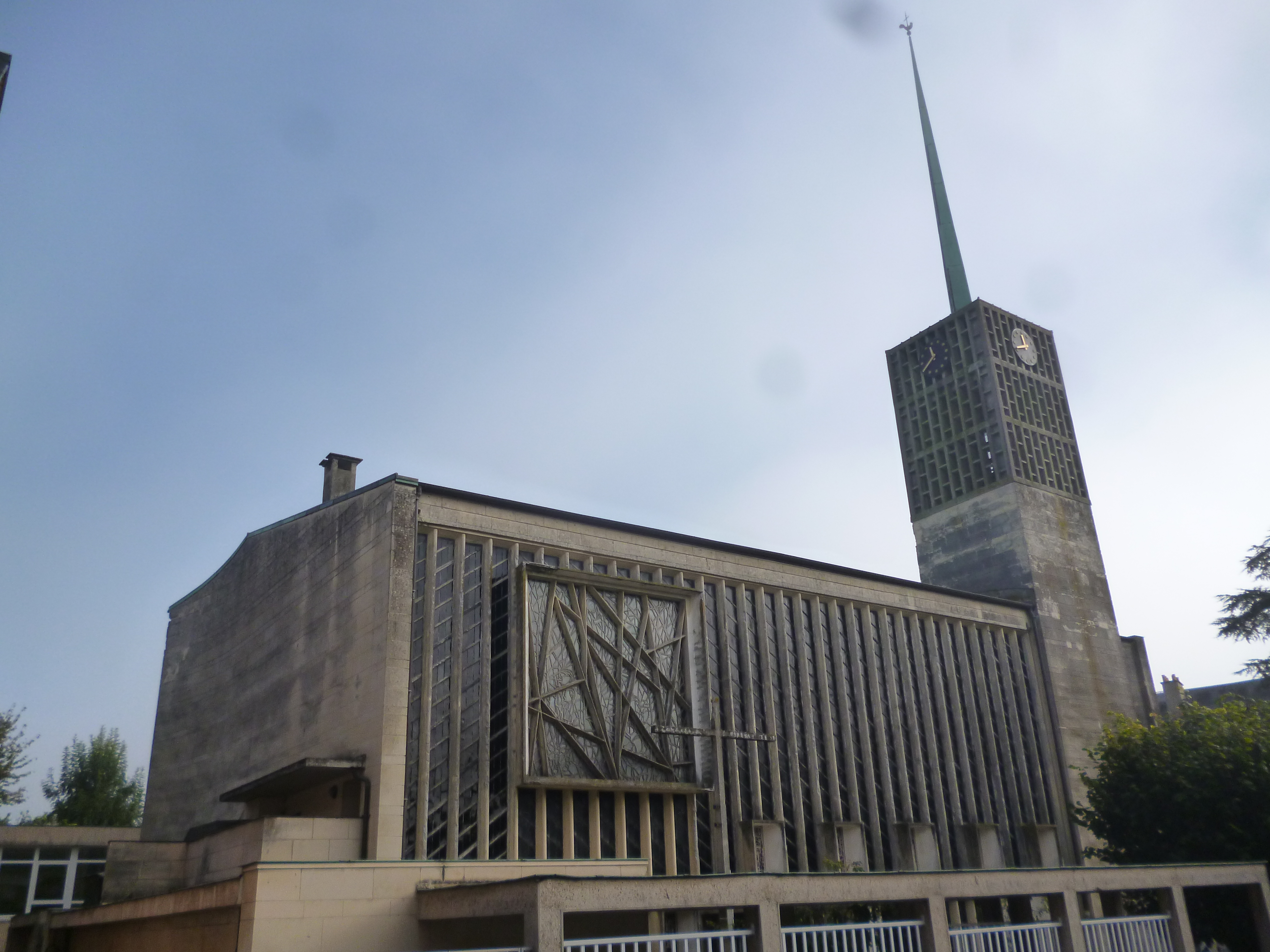 L'église Saint-Jean-Baptiste de Breteuil (Oise), oeuvre de l'architecte Louis Arretche.